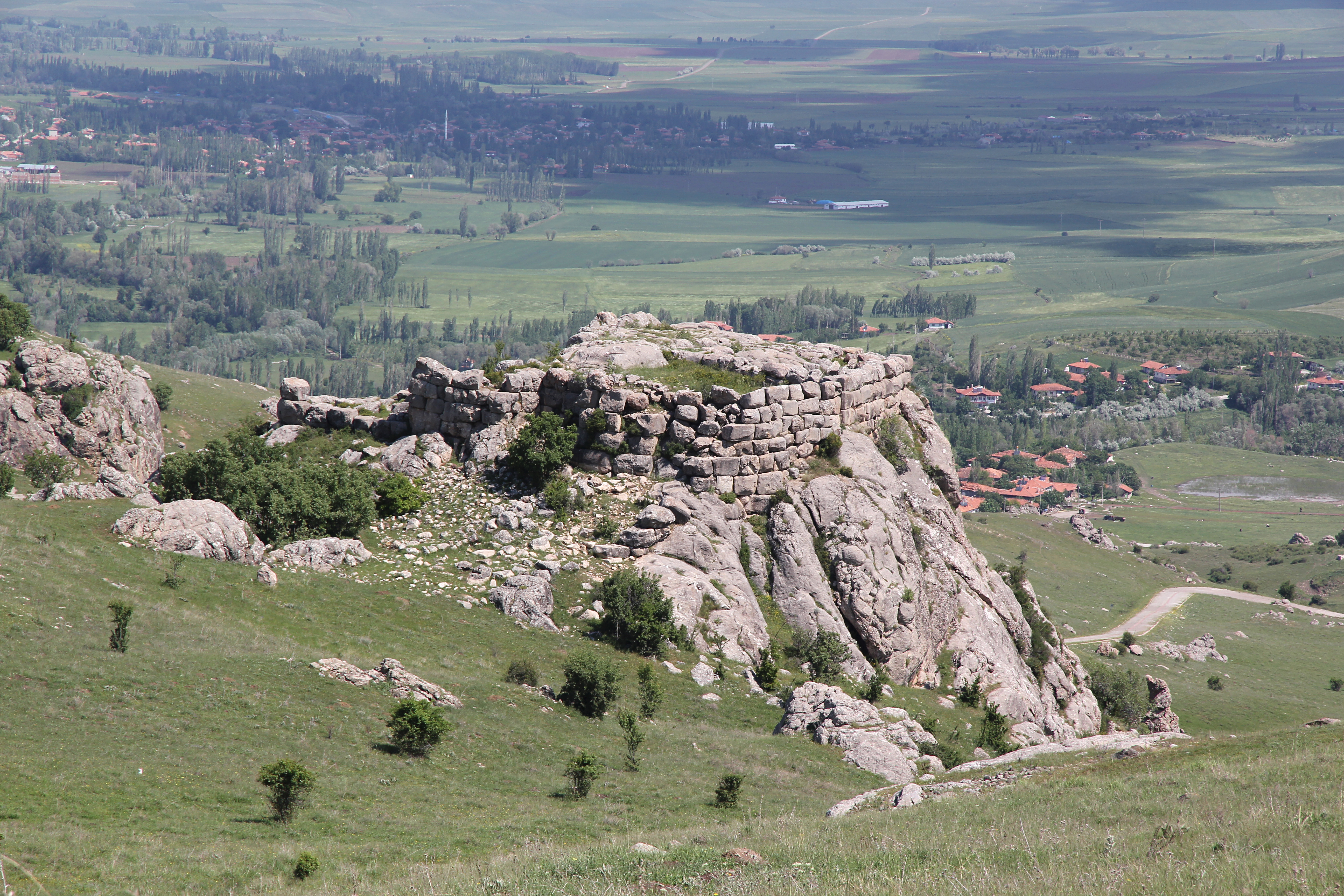 Ḫattuša, hethitische Hauptstadt bei Boğazkale, Zentraltürkei, Yenicekale